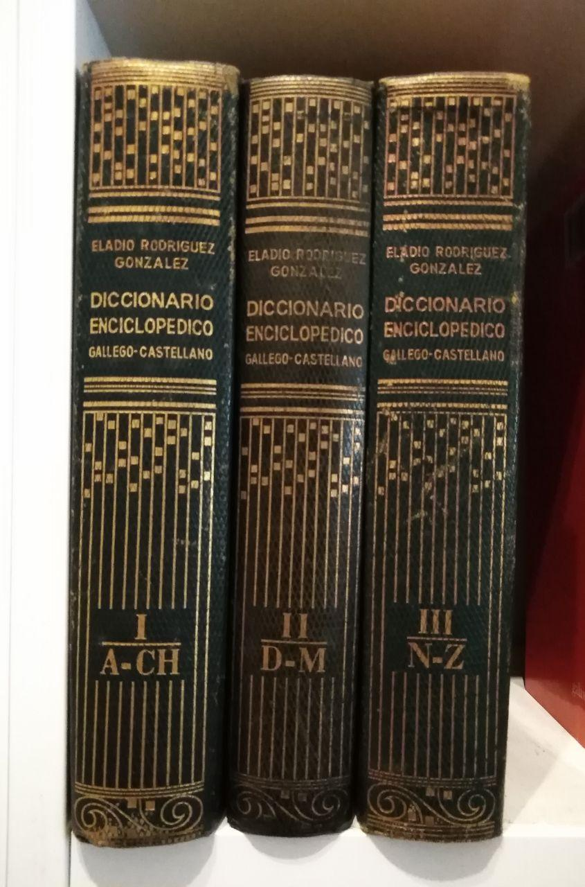 Diccionario enciclopédico gallego-castellano de Eladio Rodríguez González